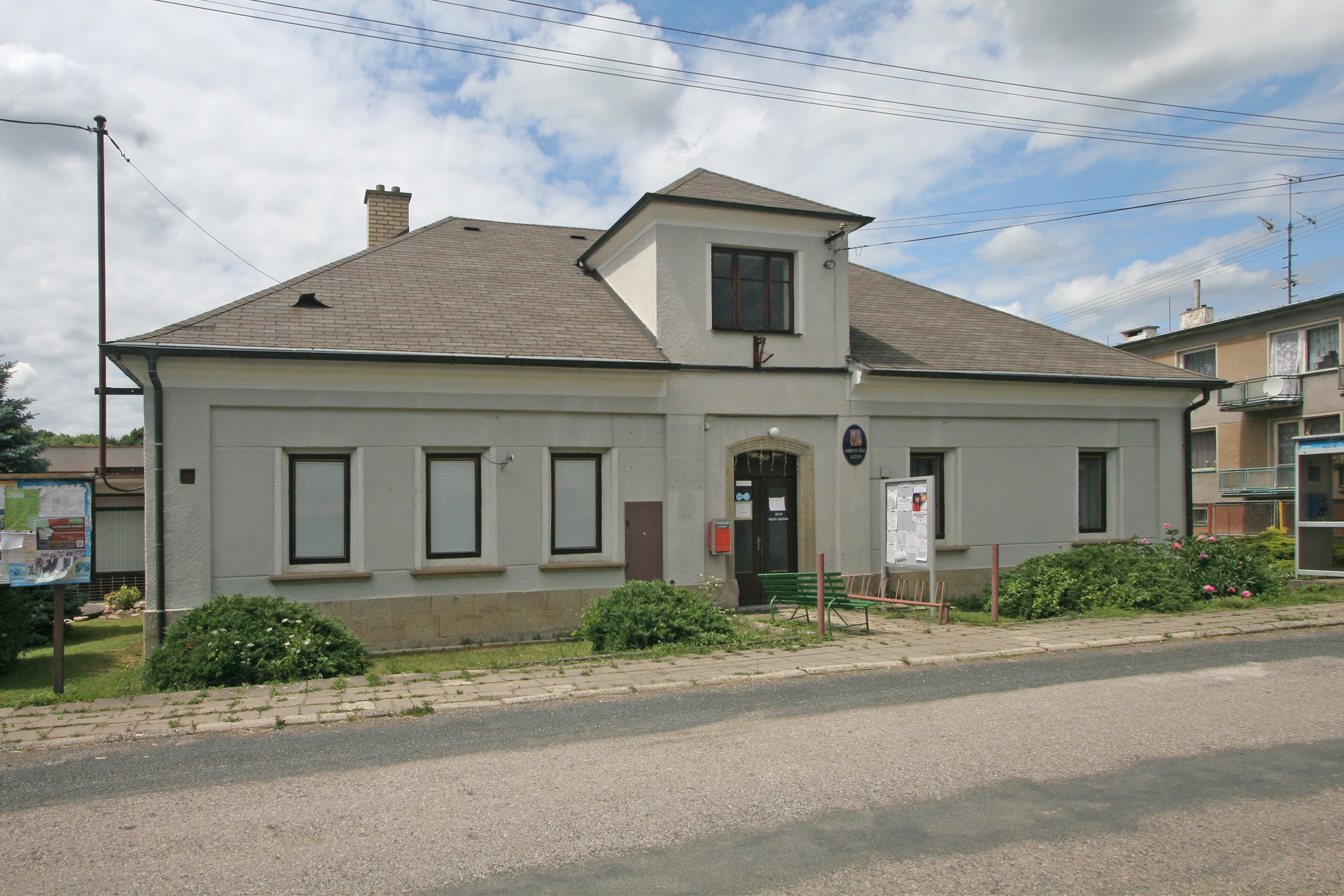 Lužany obecní úřad